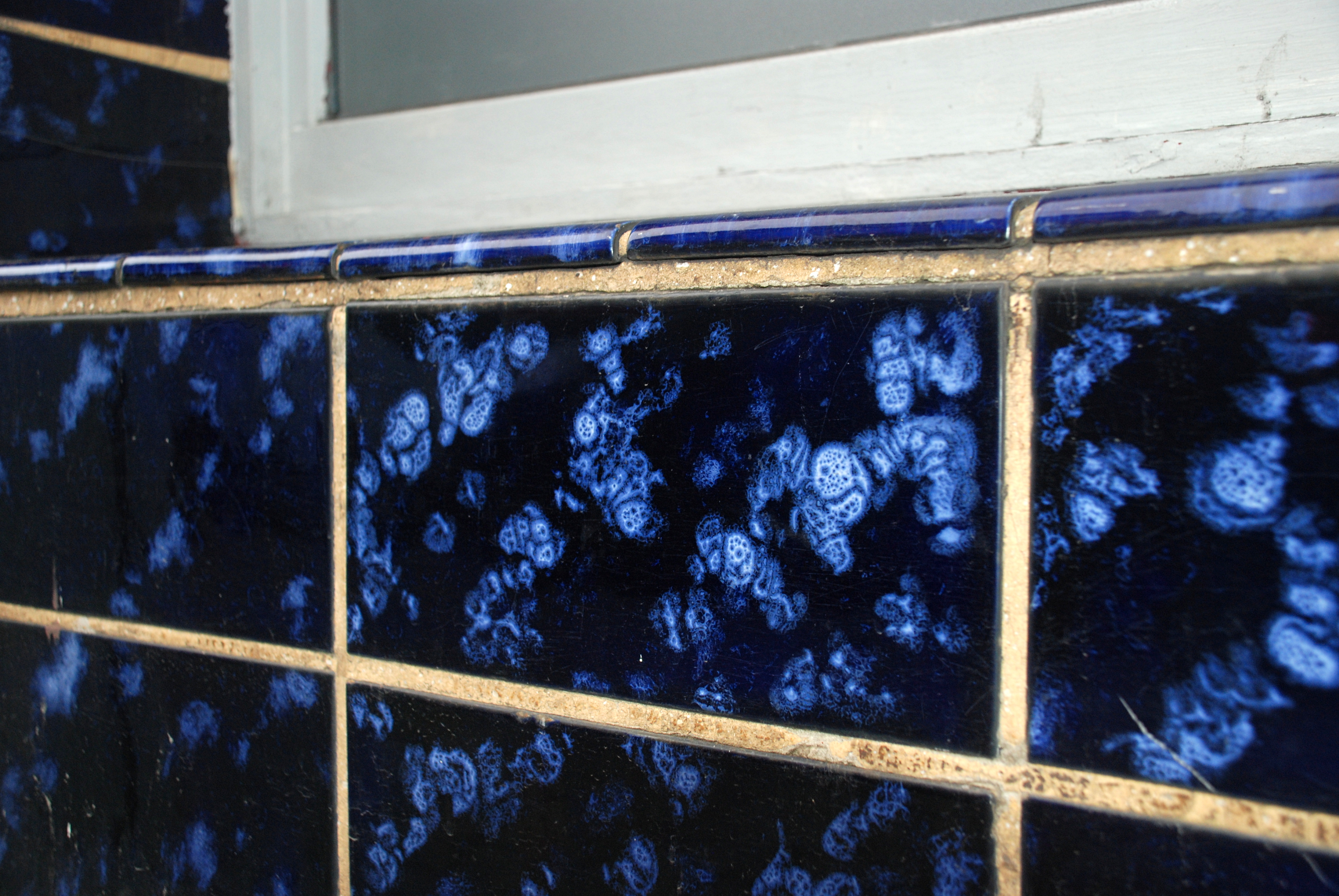 Belgique - Bruxelles - Berchem-Sainte-Agathe - Modernisme - Ateliers Helman